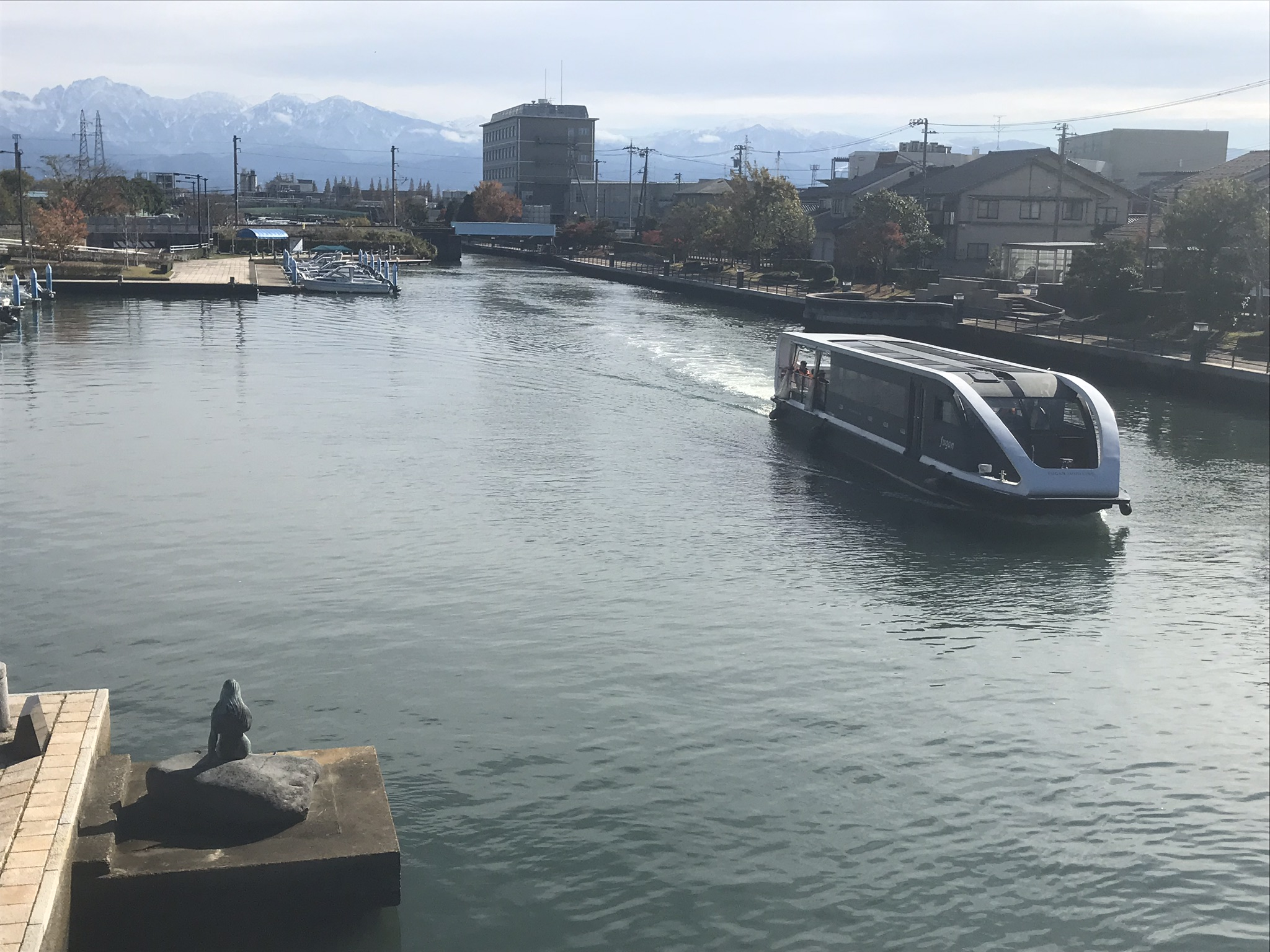 岩瀬運河1